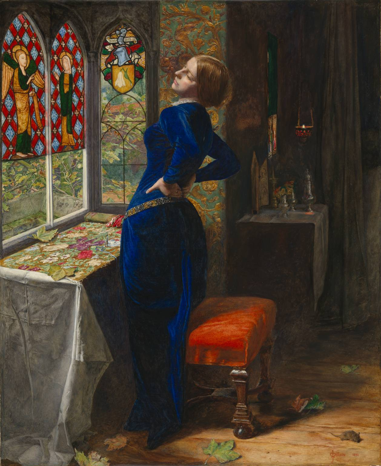 Mariana